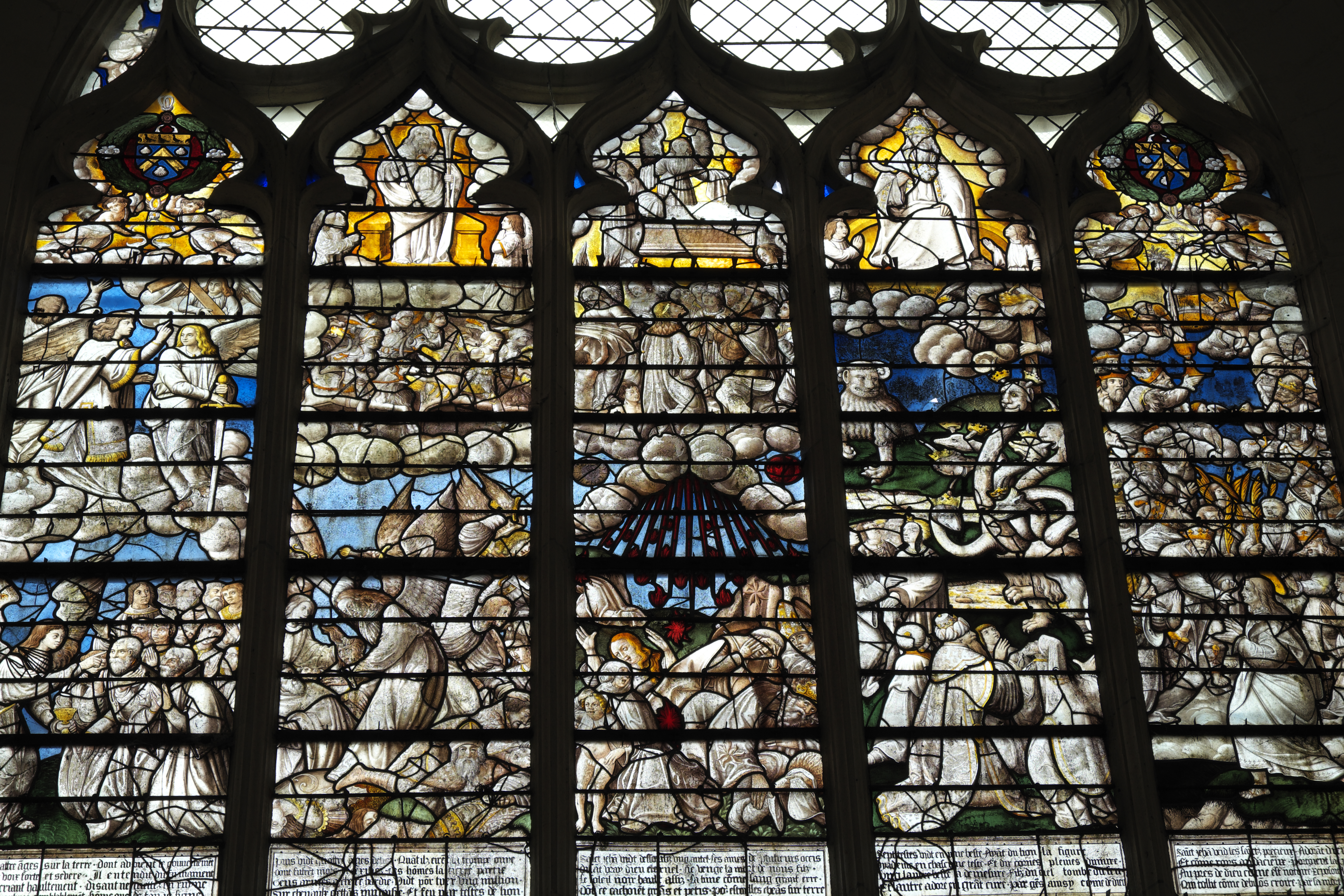 Katholische Kirche Saint-Georges in Chavanges im Département Aube (Champagne-Ardenne/Frankreich), Bleiglasfenster aus dem 16. Jahrhundert, Darstellung: Apokalypse, Hure Babylon (Ausschnitt).